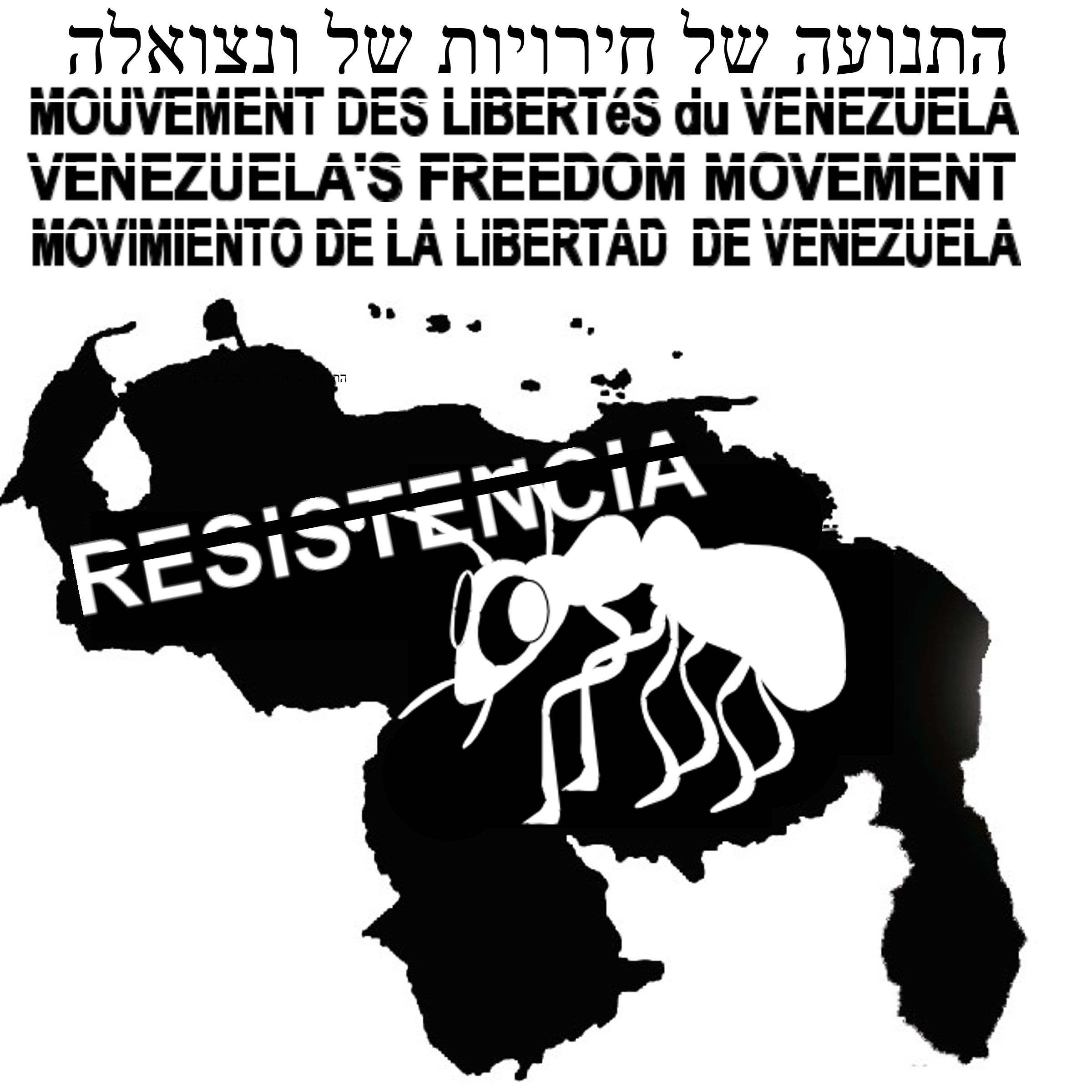 Logo del Movimiento de Resistencia No-Violenta para la Libertad de Venezuela